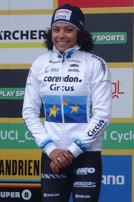 Podium U23 bij de vrouwen wereldbeker veldrijden op de Citadel van Namen op zondag 22 december 2019